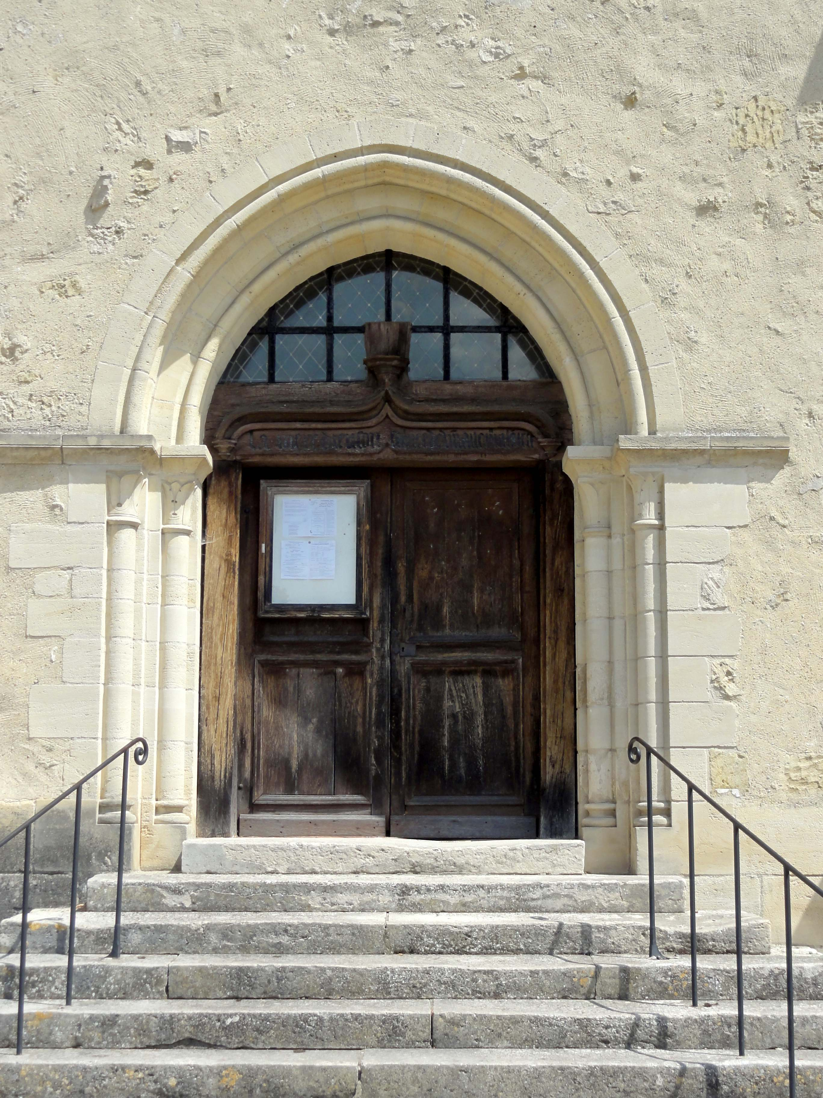 Portail latéral sud.